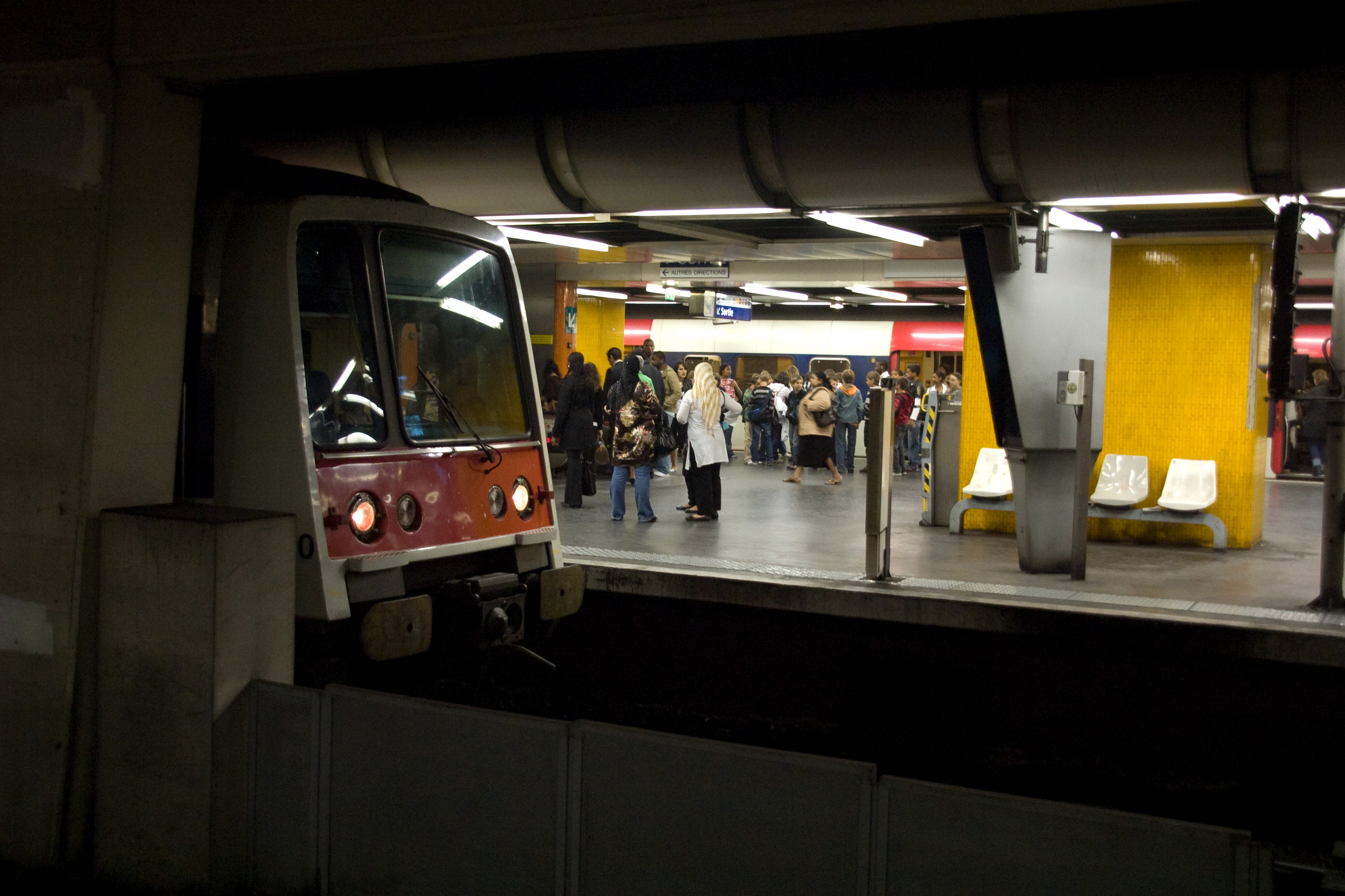 Station Châtelet - Les Halles, Paris, France